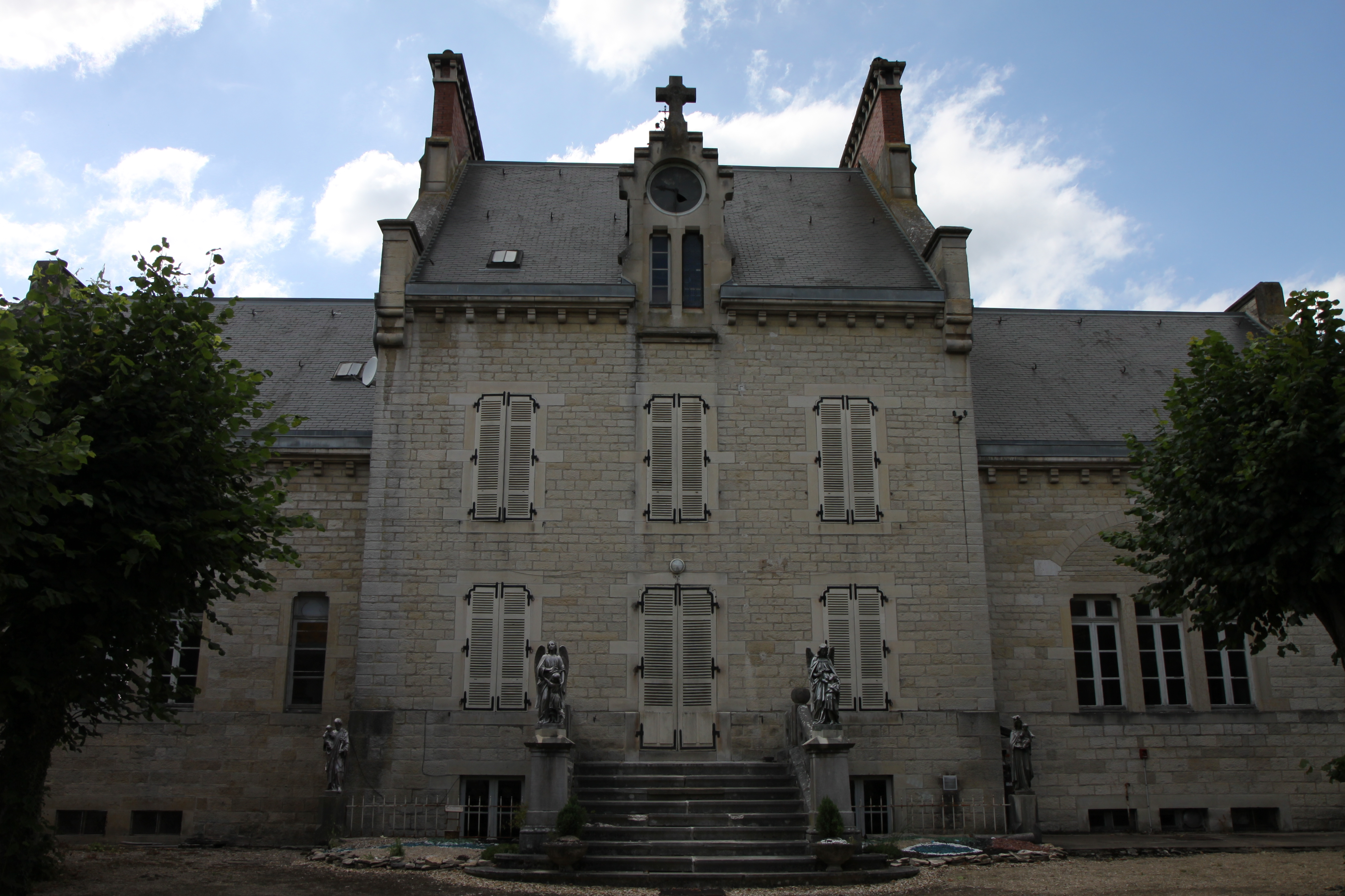 .Vue de la commune de Sainte Marie sur Ouche.